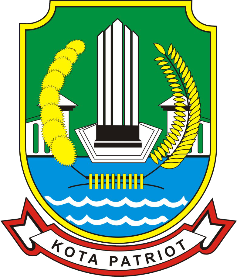 Publiek domein Stadswapen Bekasi Indonesië